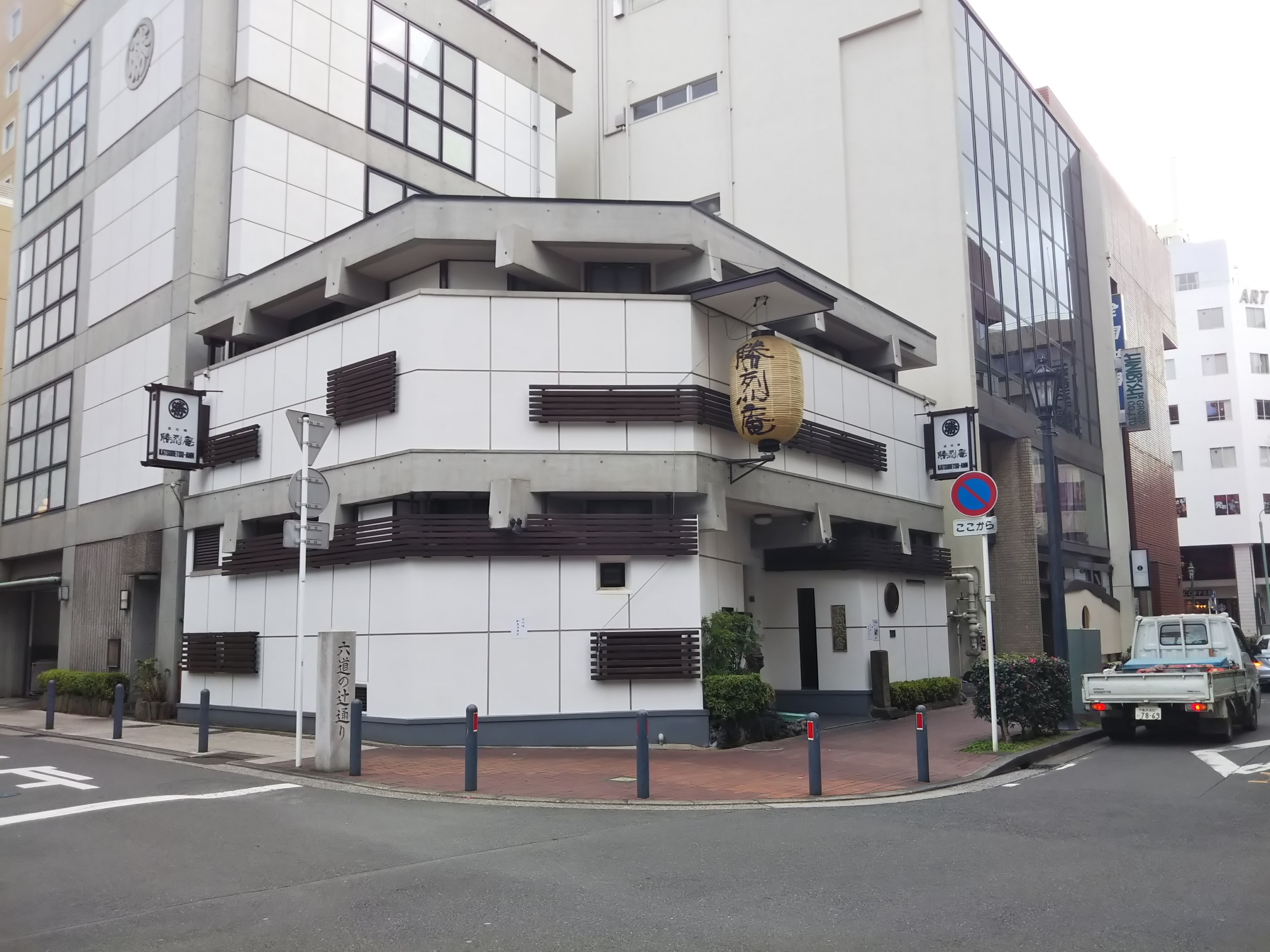 横浜市中区常盤町、勝烈庵馬車道総本店